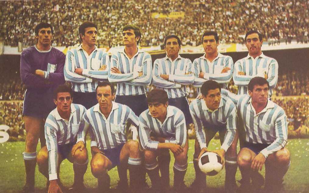 Plantel de Racing Club que obtuvo la Copa Intercontinental tras derrotar al Celtic FC en 1967. Parados: Cejas, Basile, Perfumo, Martín, Chabay y Rulli. Agachados: Cardoso, Maschio, Cárdenas, Rodríguez y Raffo.